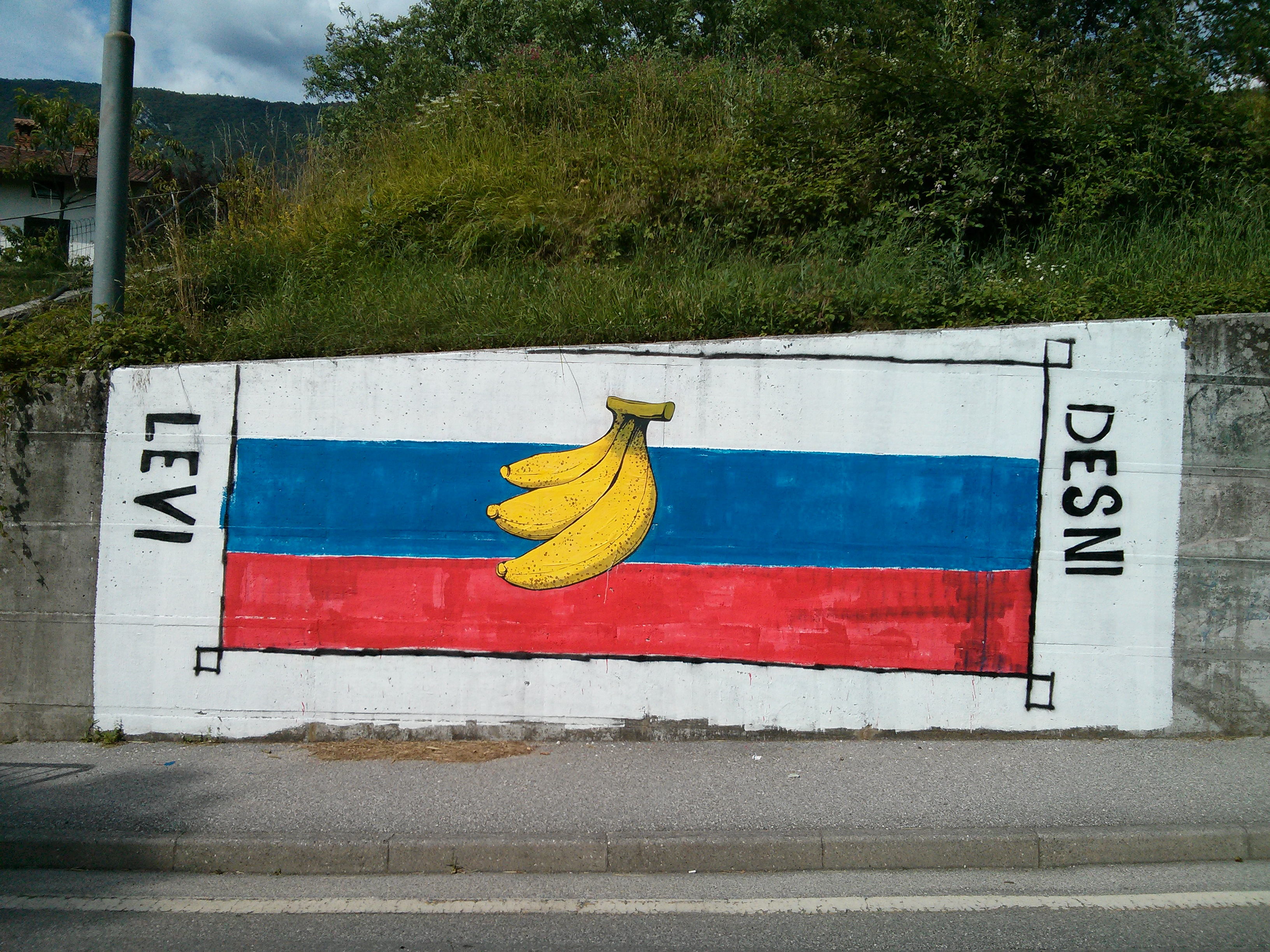 Banana Republic of Slovenia.